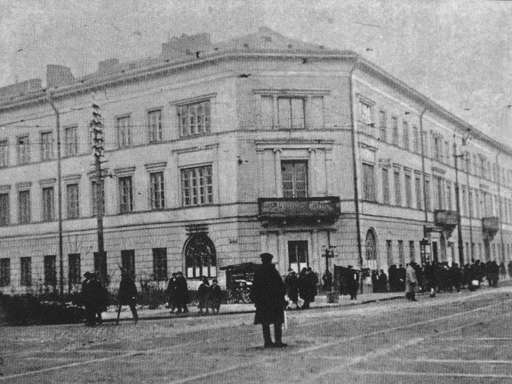 Kamienica Jasińskiego, w okresie międzywojennym siedziba Ministerstwa Komunikacji, przy ul. Nowy Świat 14 (róg al. 3 maja) w Warszawie